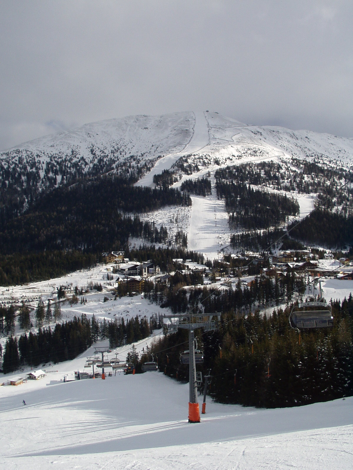 Die Katschberghöhe, fotografiert vom Tschaneck aus. Im Hintergrund der Aineck